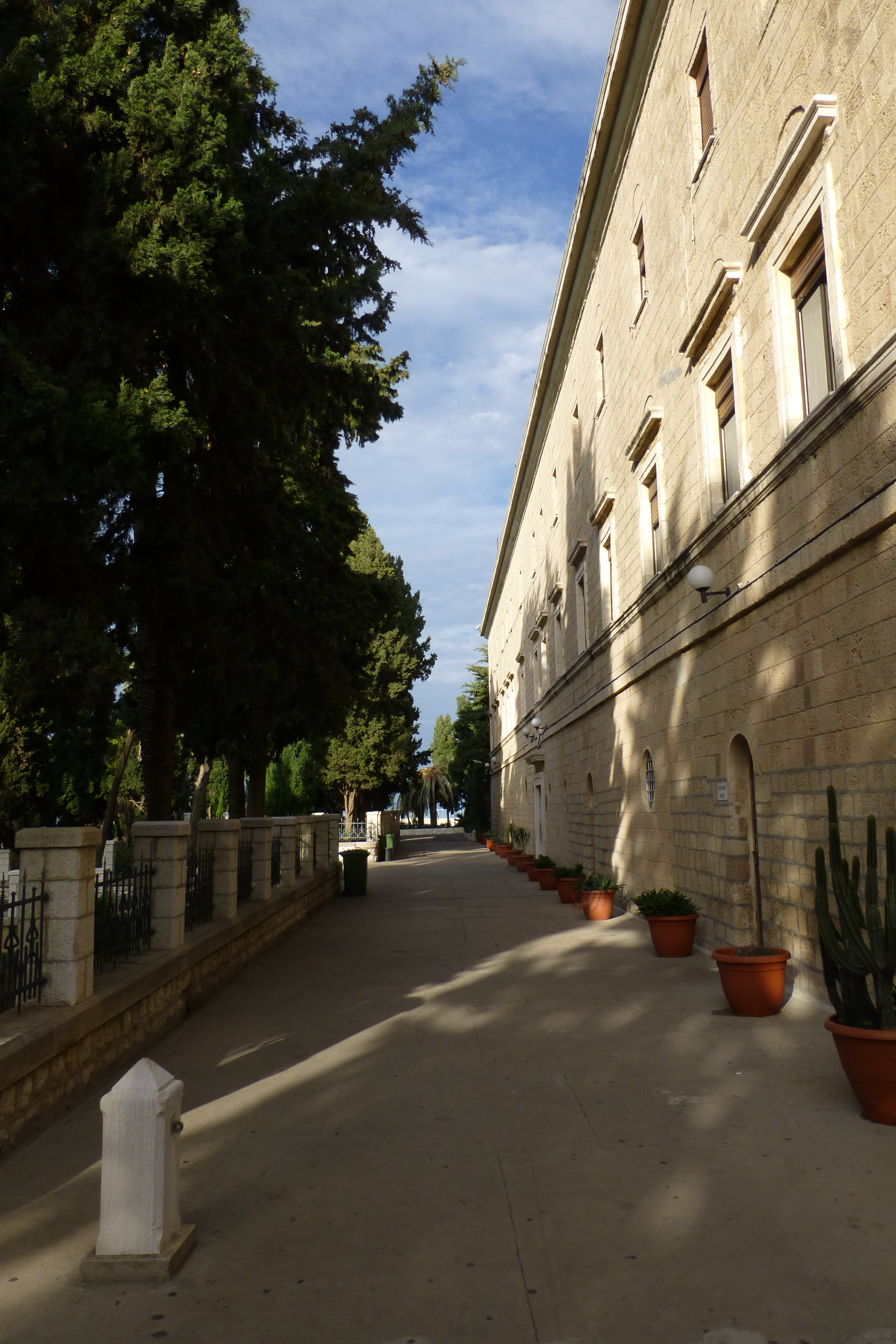 המנזר הכרמליתי (סטלה מאריס) בחיפה. סְטֶלָה מַארִיס (מלטינית: Stella Maris – "כוכב הים") הוא אזור בראש הכרמל ובו מתחמים של מנזר וכנסייה בני מאות שנים, קפלות ושאר בניינים השייכים למסדר הכרמליתי. המושג "כוכב הים" במסורת הנוצרית הקתולית הוא אחד האספקטים של הבתולה הקדושה, שבהקשר זה מוצגת כקשורה במיוחד אל הים ומגוננת על יורדי ים, מלחים ודייגים. המסדר הכרמליתי נוסד במקורו על הר הכרמל בתקופת ממלכת הצלבנים בידי נזירים שחיו במערות בהשראת אליהו הנביא. המסדר שגשג והתרחב משם לרחבי אירופה.